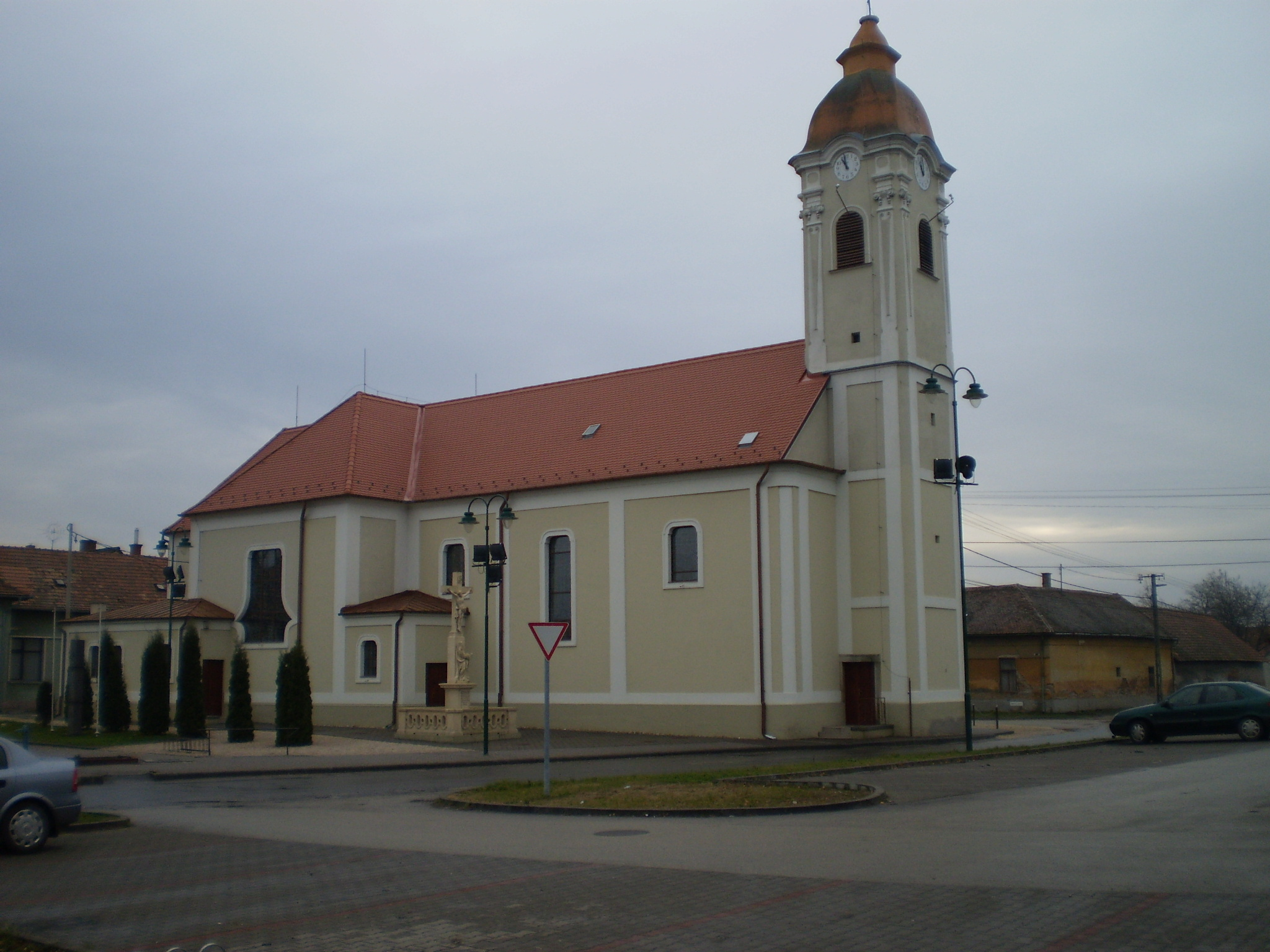 Bősárkány templom.